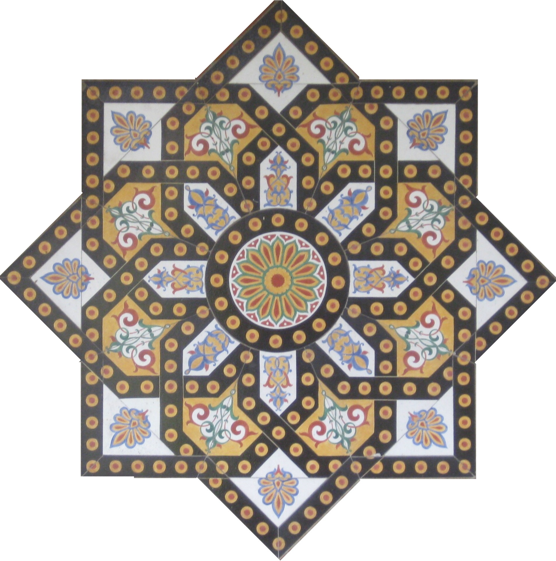 Karl Ludwig von Zanth: achtzackiger Stern aus mauresken Keramikfliesen, Typ 5 „Fensterrose“, Entstehungsjahr 1847/1848, Stuttgart, Wilhelma, Wandelgang im Maurischen Garten.